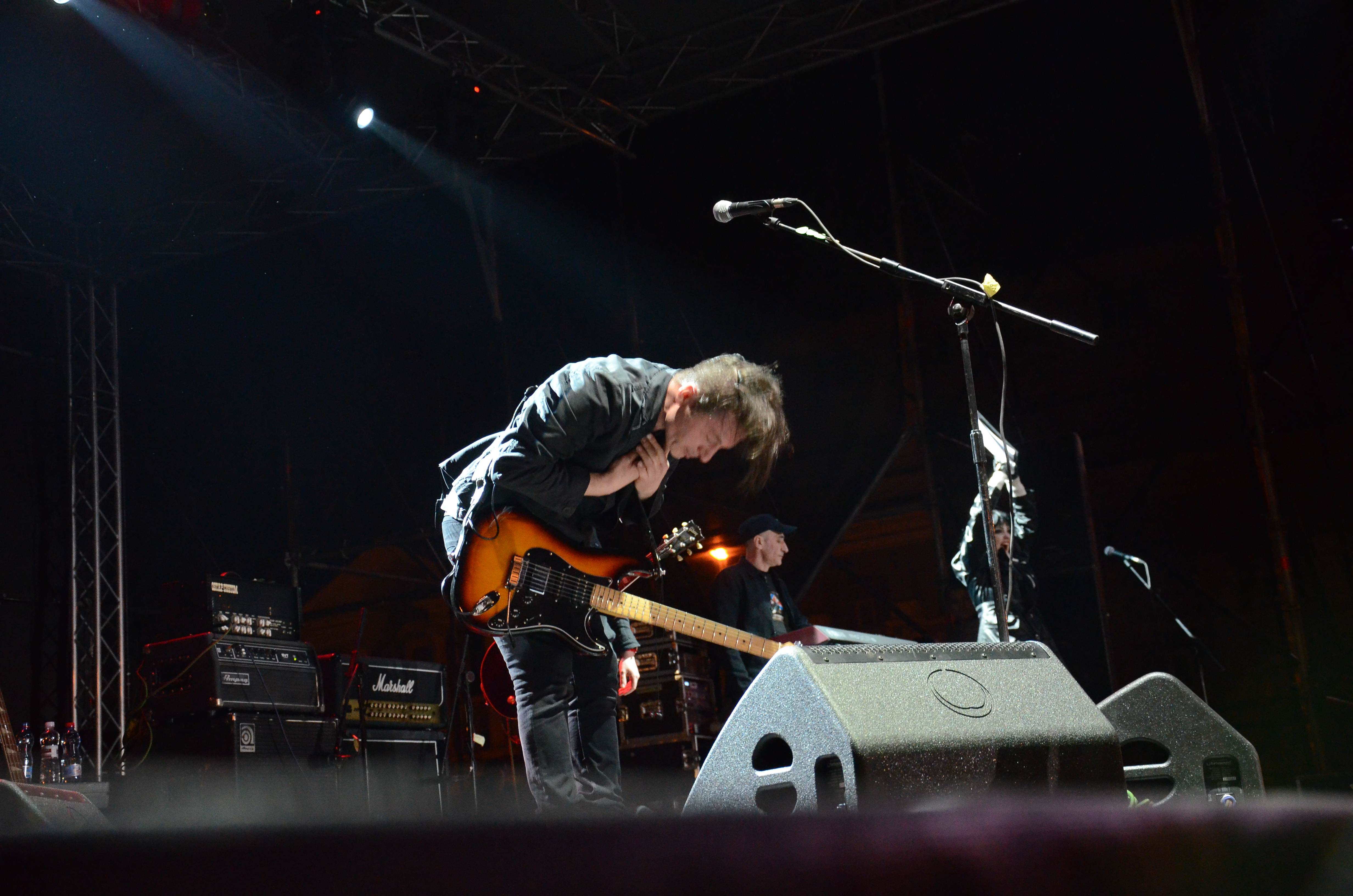 День солидарности молодёжи в Донецке